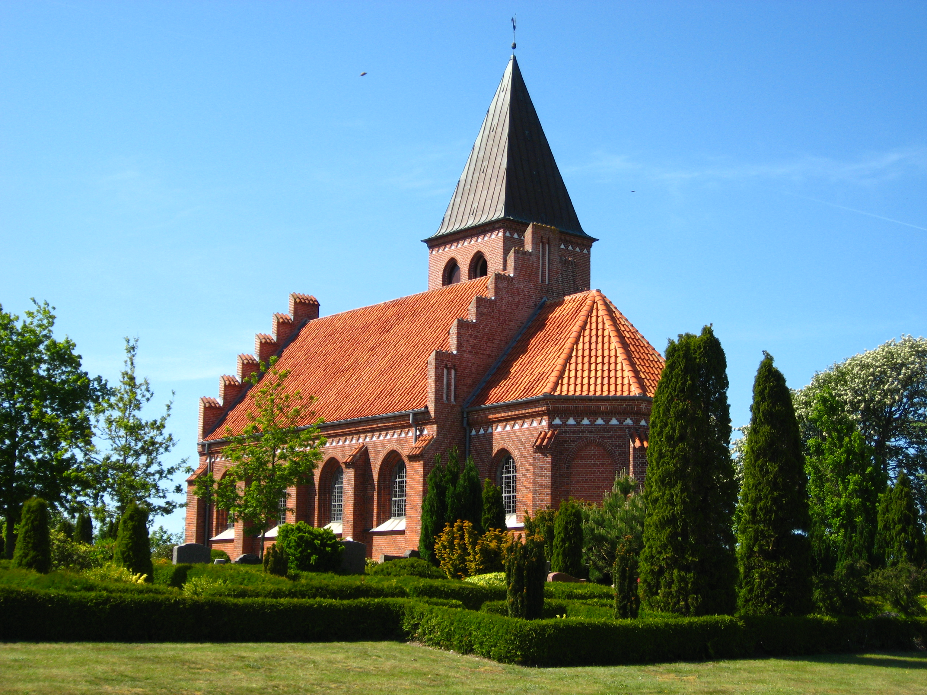 Lyngså Kirke, Frederikshavn Kommune